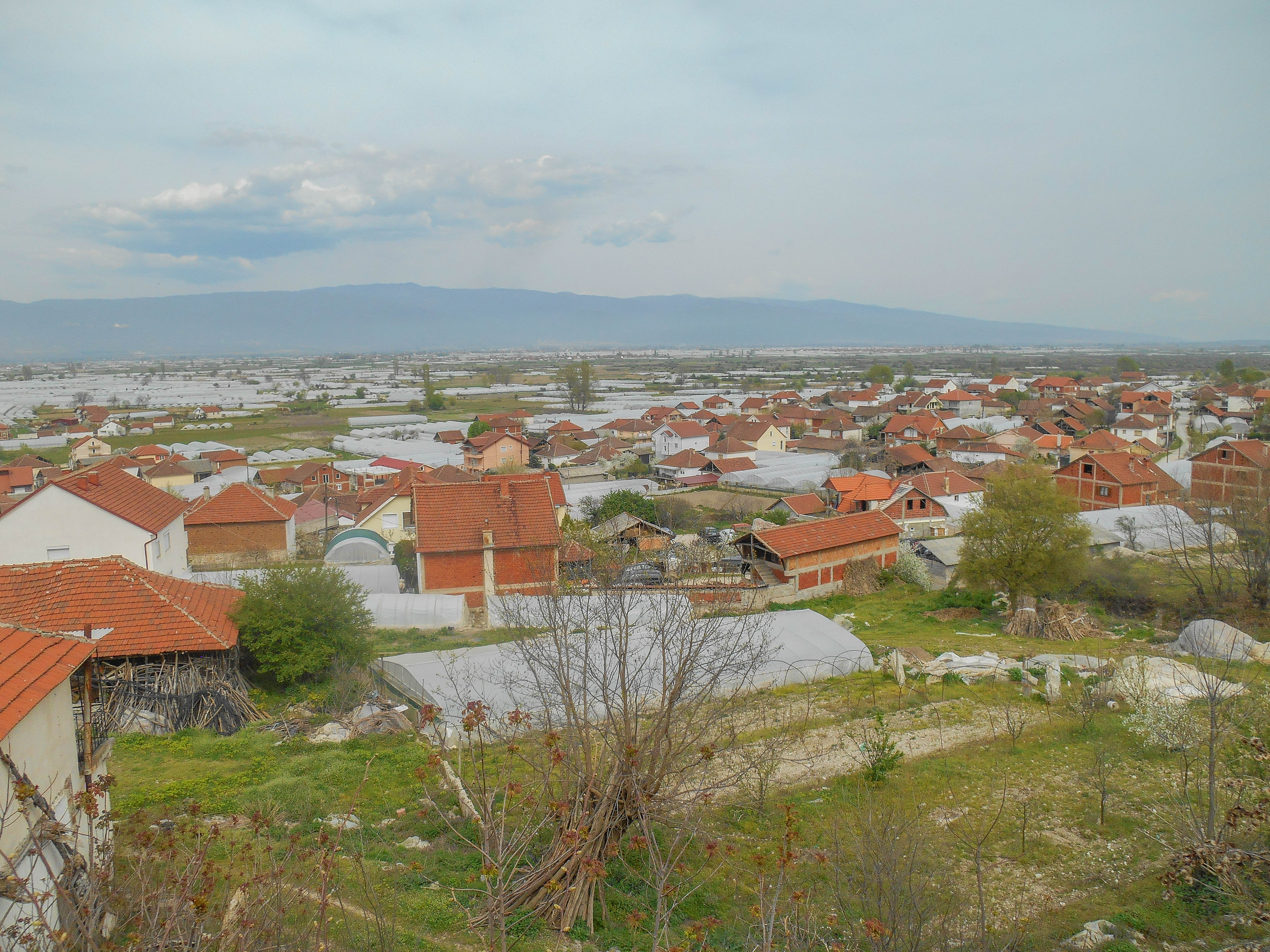 Поглед кон селото